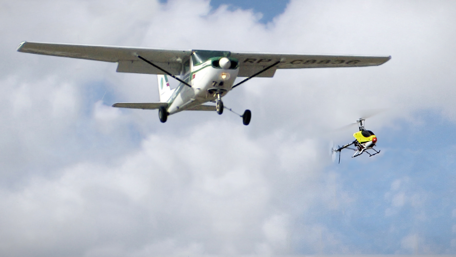 Das Foto zeigt einen Helikopterstunt: ein RC-Helikopter wird aus einem fliegenden Flugzeug heraus gesteuert - ein bislang weltweit einmaliger Stunt